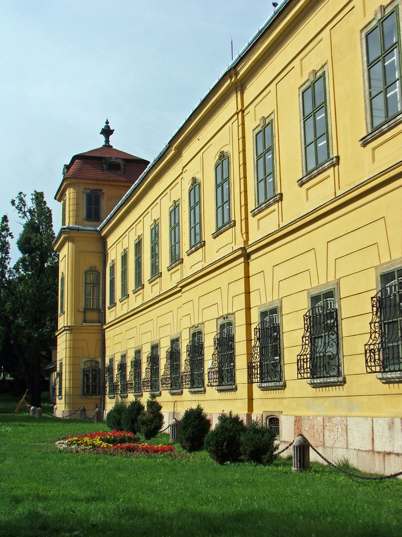 Esterhazy palace in Tata